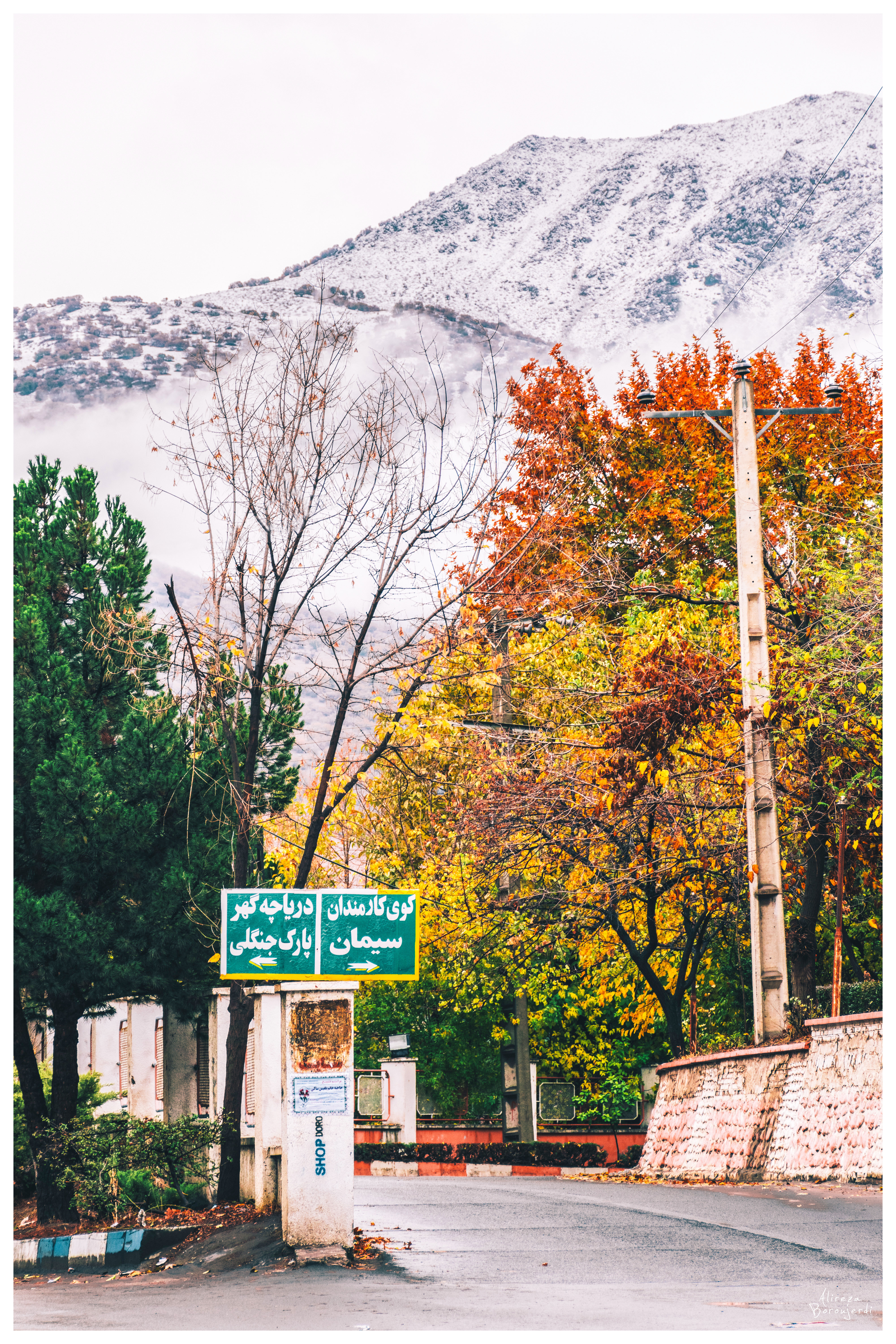 پارک جنگلی دورود